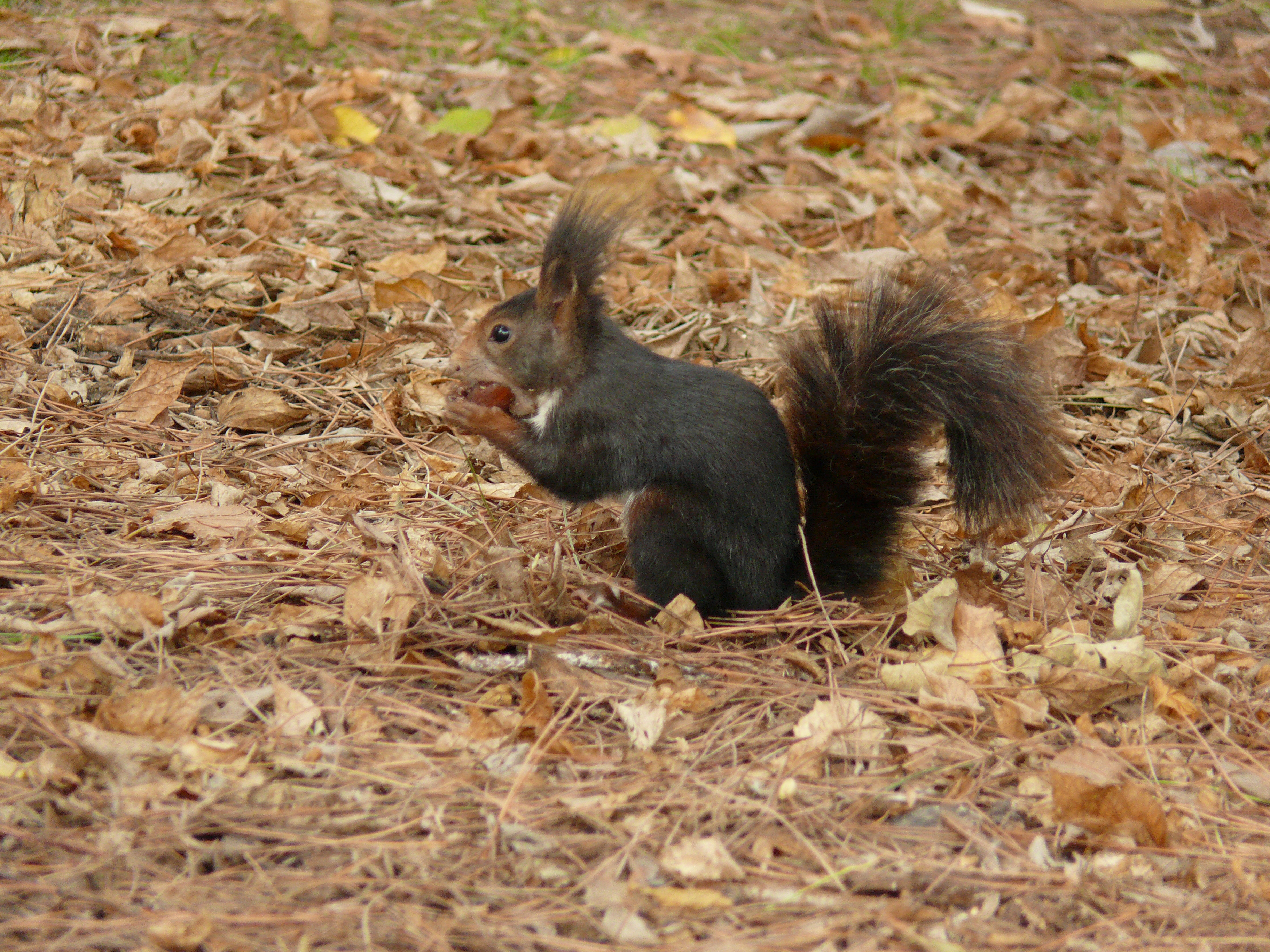 Ardilla española